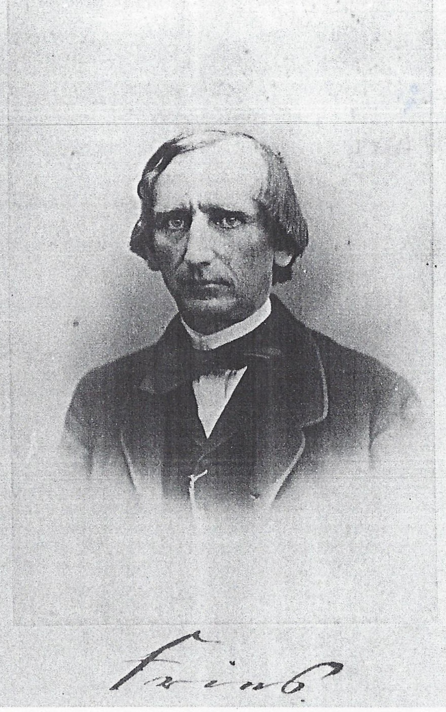 Signierte Porträtotografie von Hugo Friedrich Fries (1818-1889)